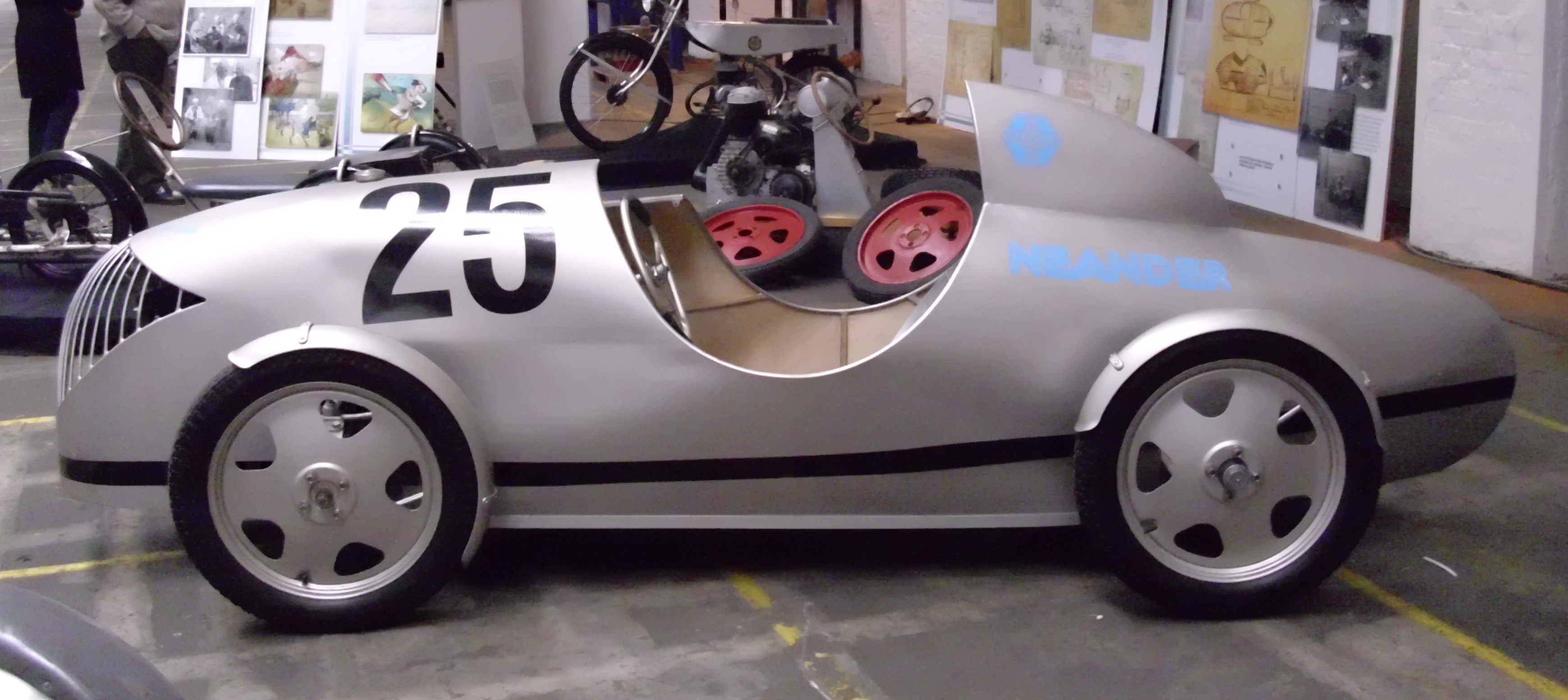 Neander Fahrmaschine 1934-1939